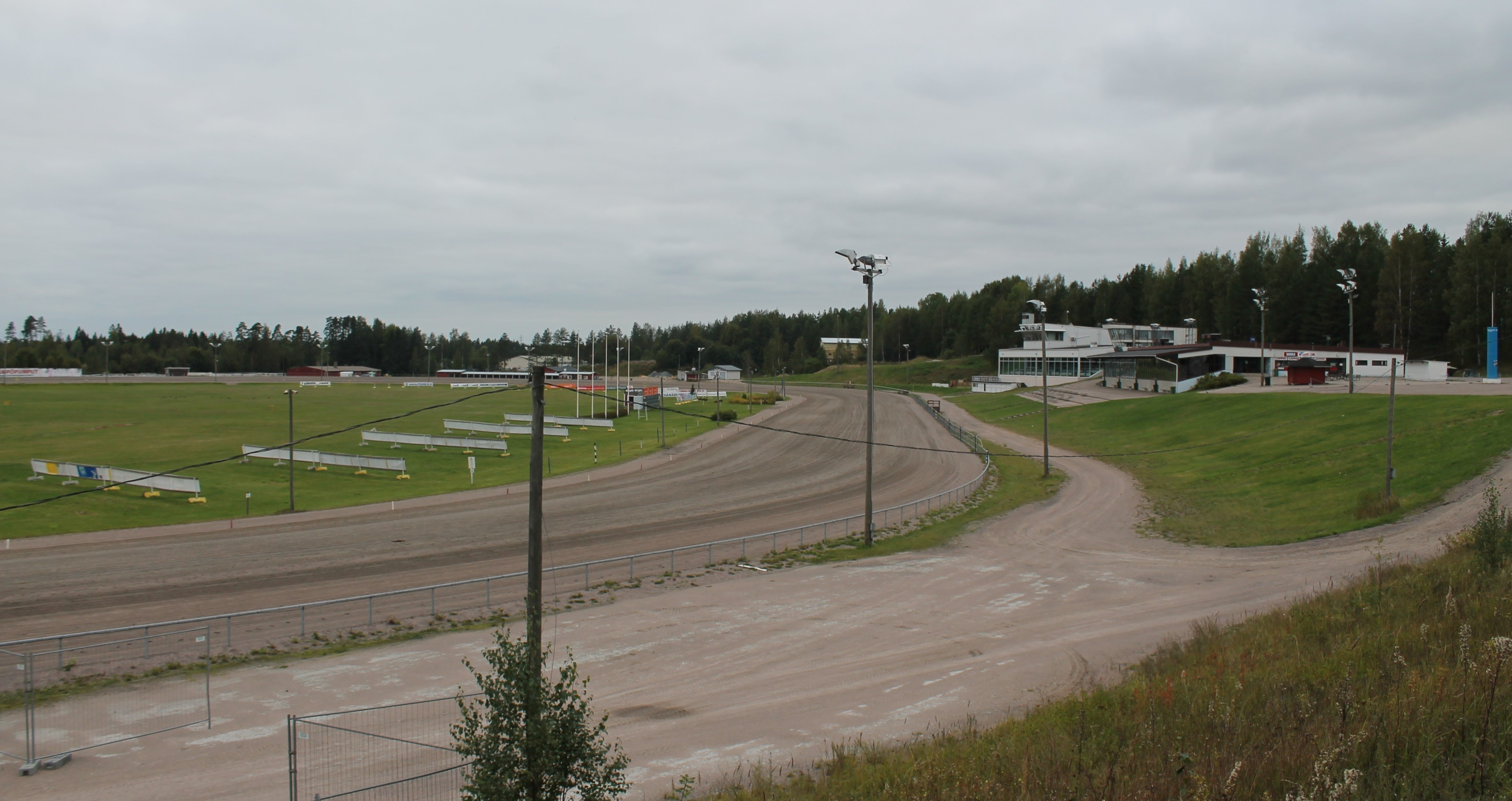 Lappeenrannan ravirata.